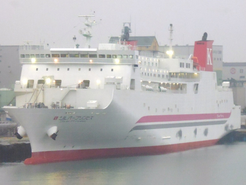 八戸港に接岸する川崎近海汽船シルバープリンセス シルバークイーン船上にて撮影